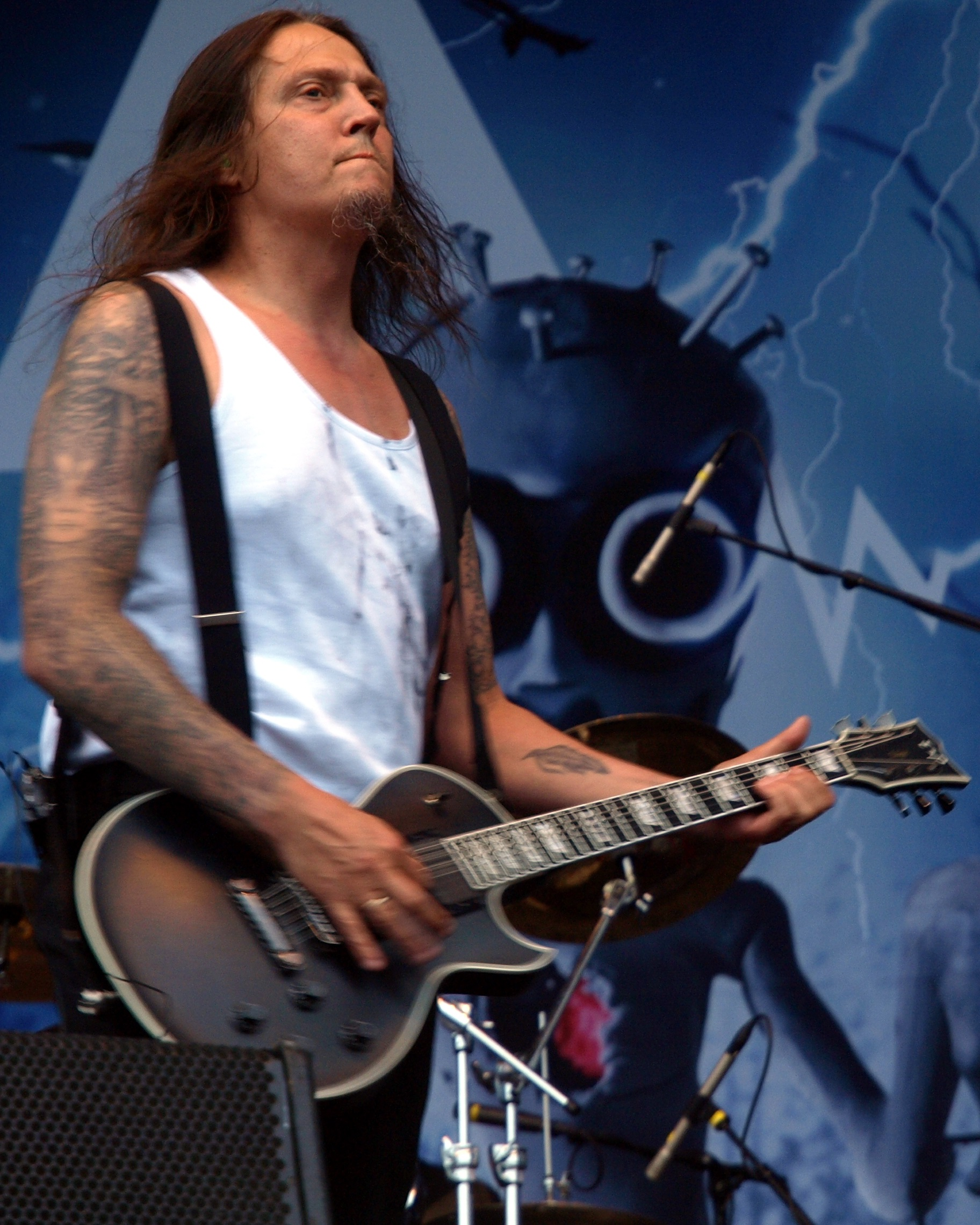 Peter Tägtgren beim Konzert mit Pain